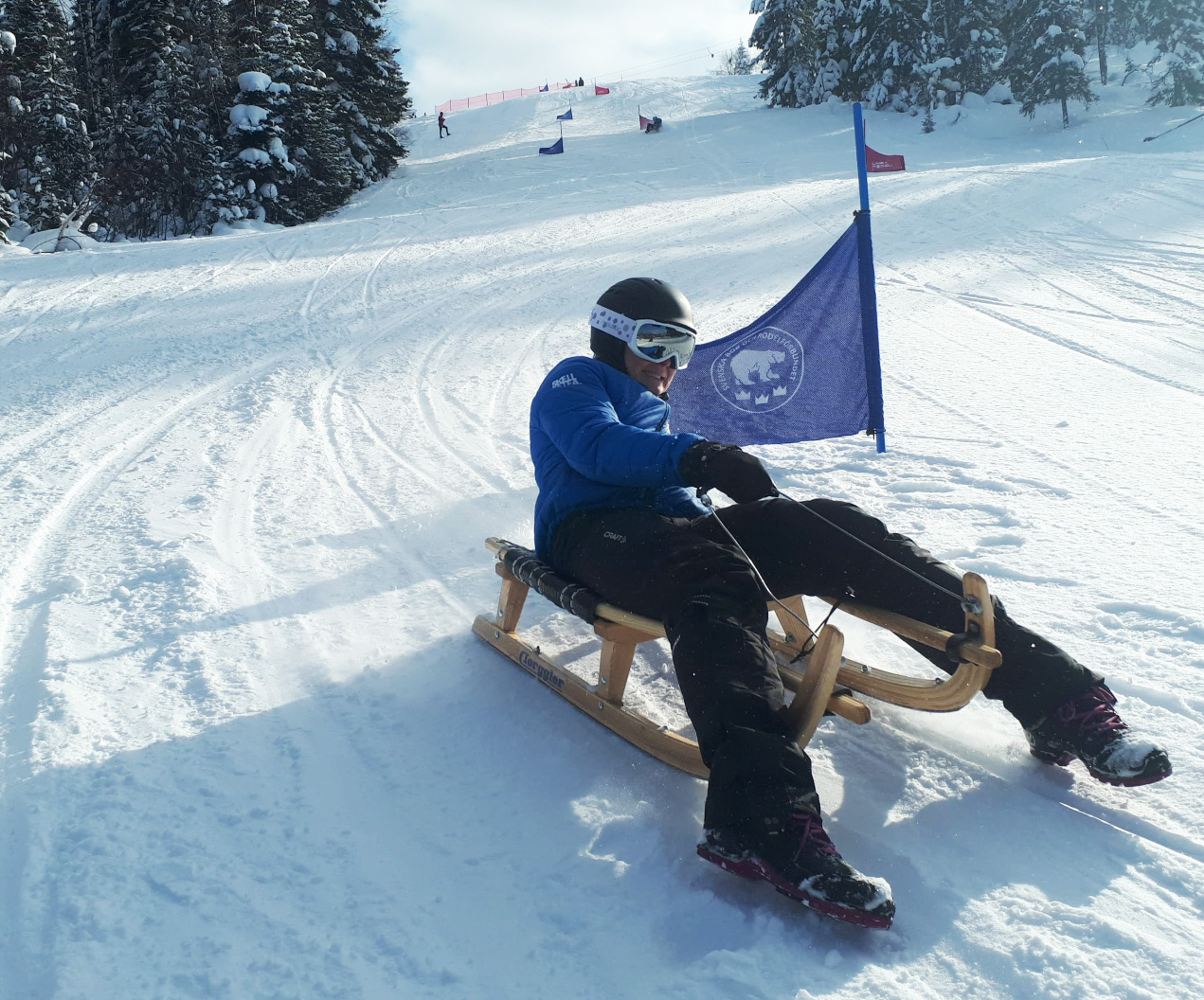 Alpinrodel, åkteknik